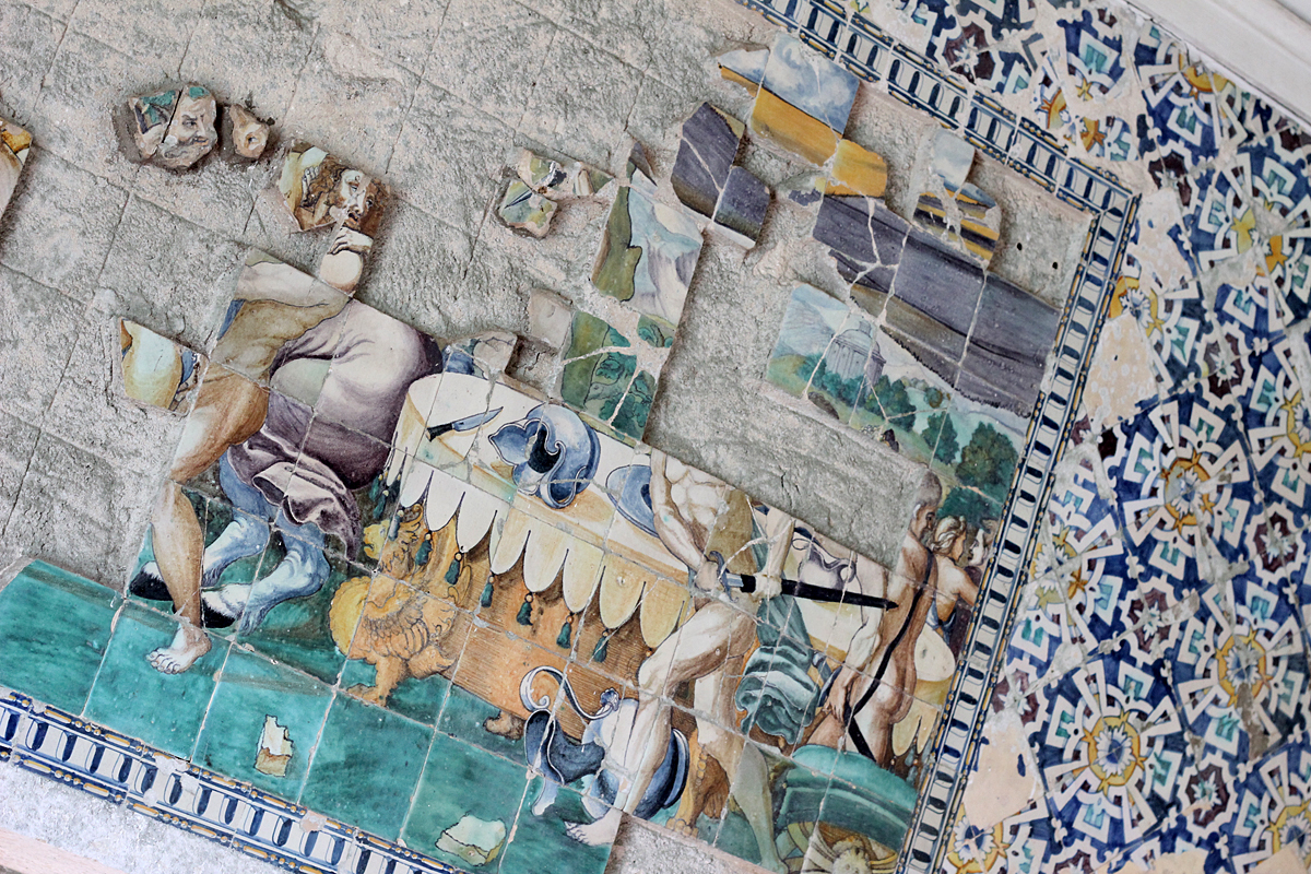 Quinta da Bacalhôa